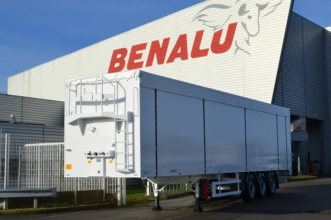 Benne aluminium blanche